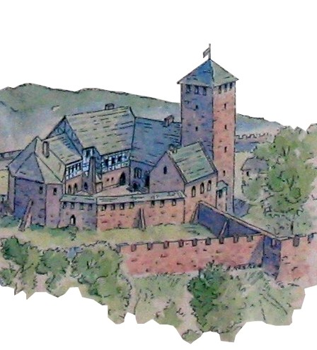 Rekonstruktion der Burg Wartenberg bei Angersbach/Hessen